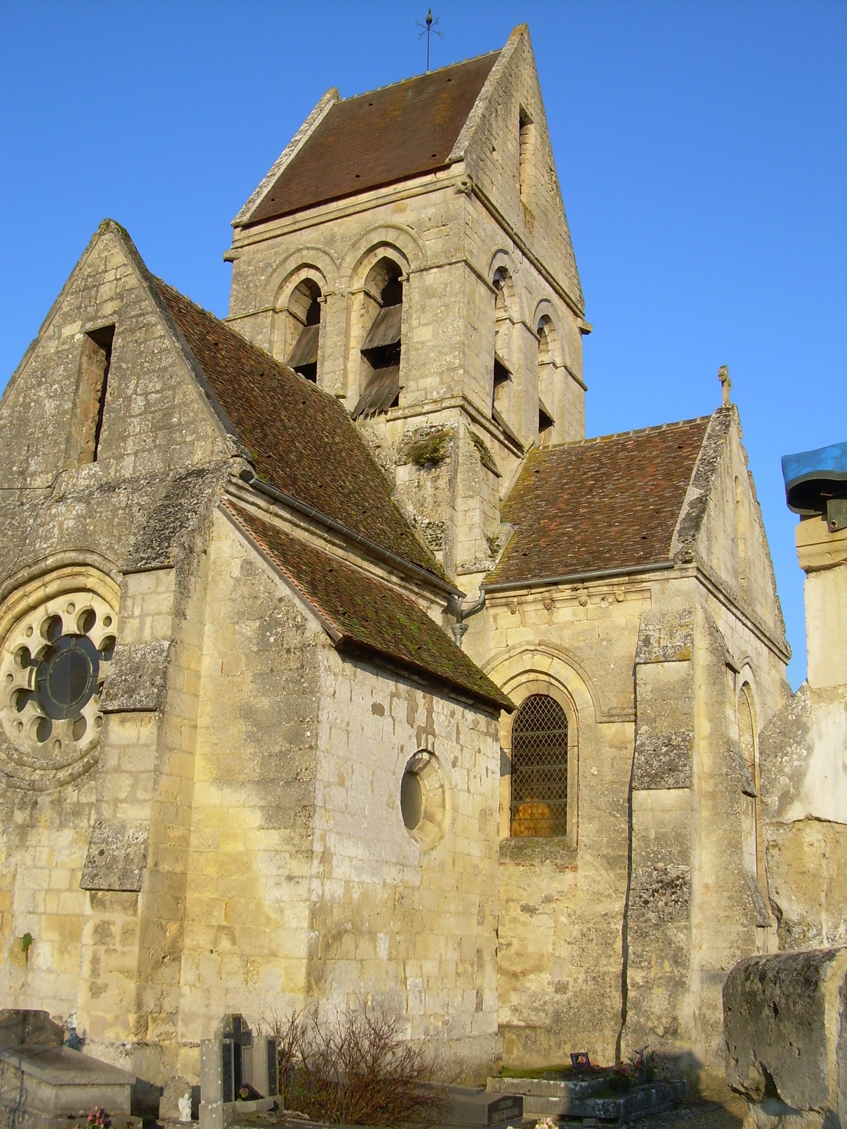 Vue de l'église de Chaillevois côté rue